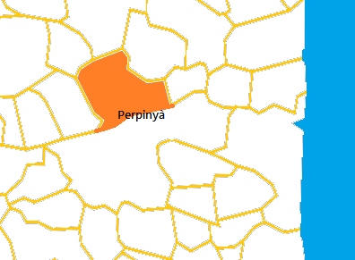 Mapa del Cantó de Perpinyà 1 elaborat a partir d'un mapa de lliure disposició